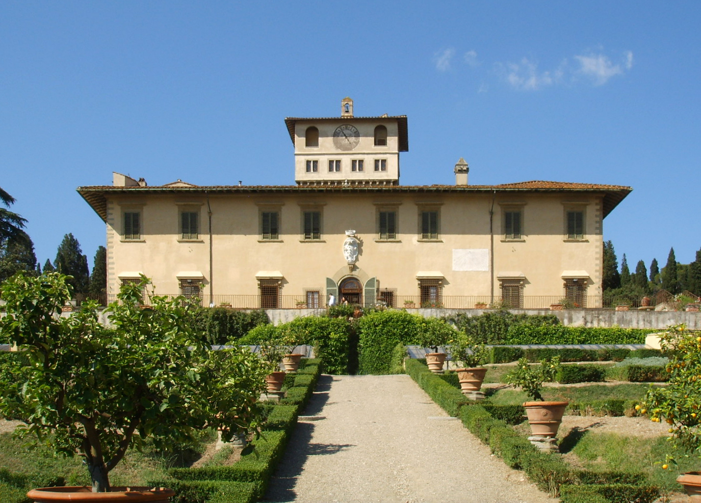 Villa La Petraia, Florence, Italy